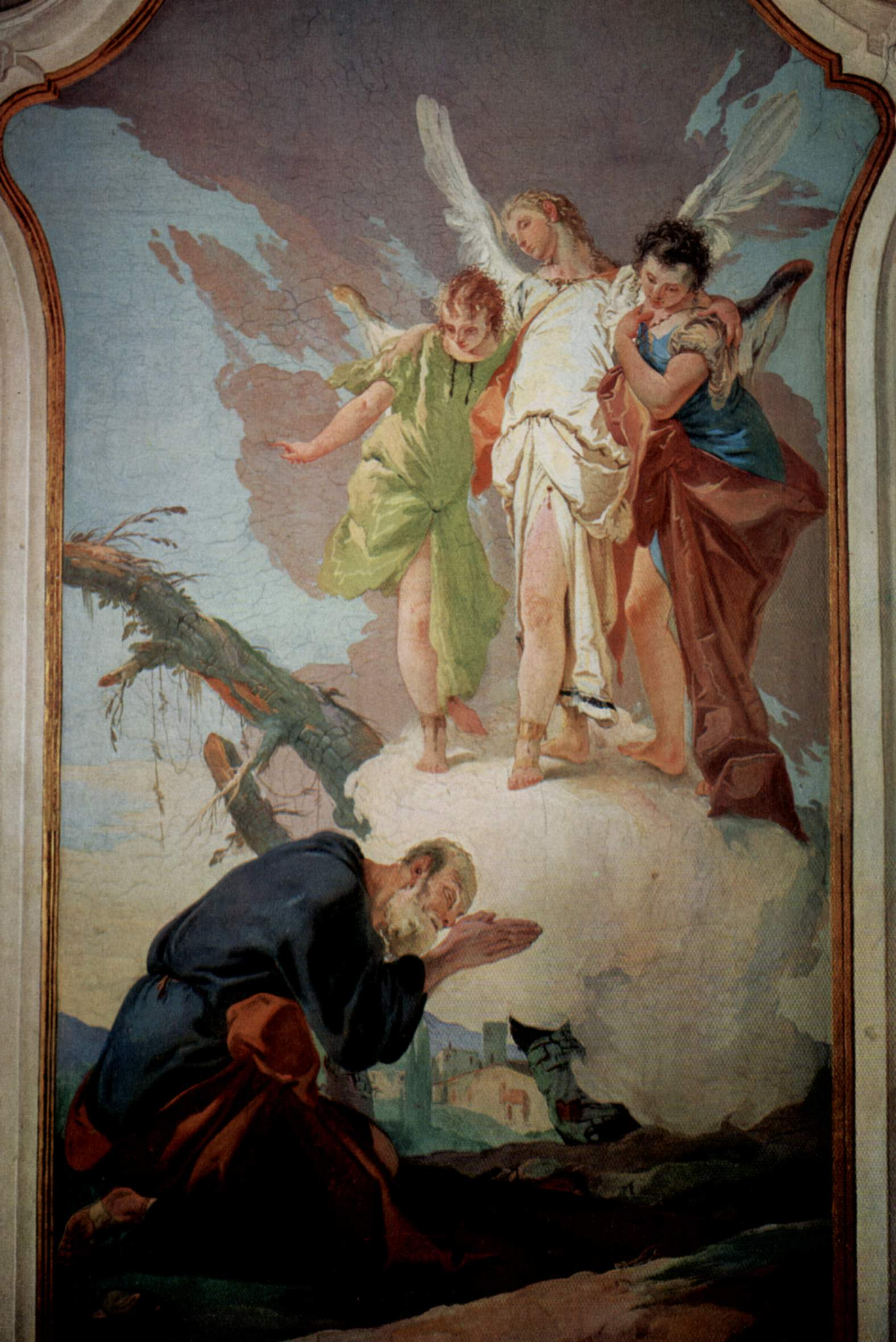 Fresken zu biblischen Szenen im Bischofspalast von Undine, Szene: Die Erscheinung der Engel vor Abraham